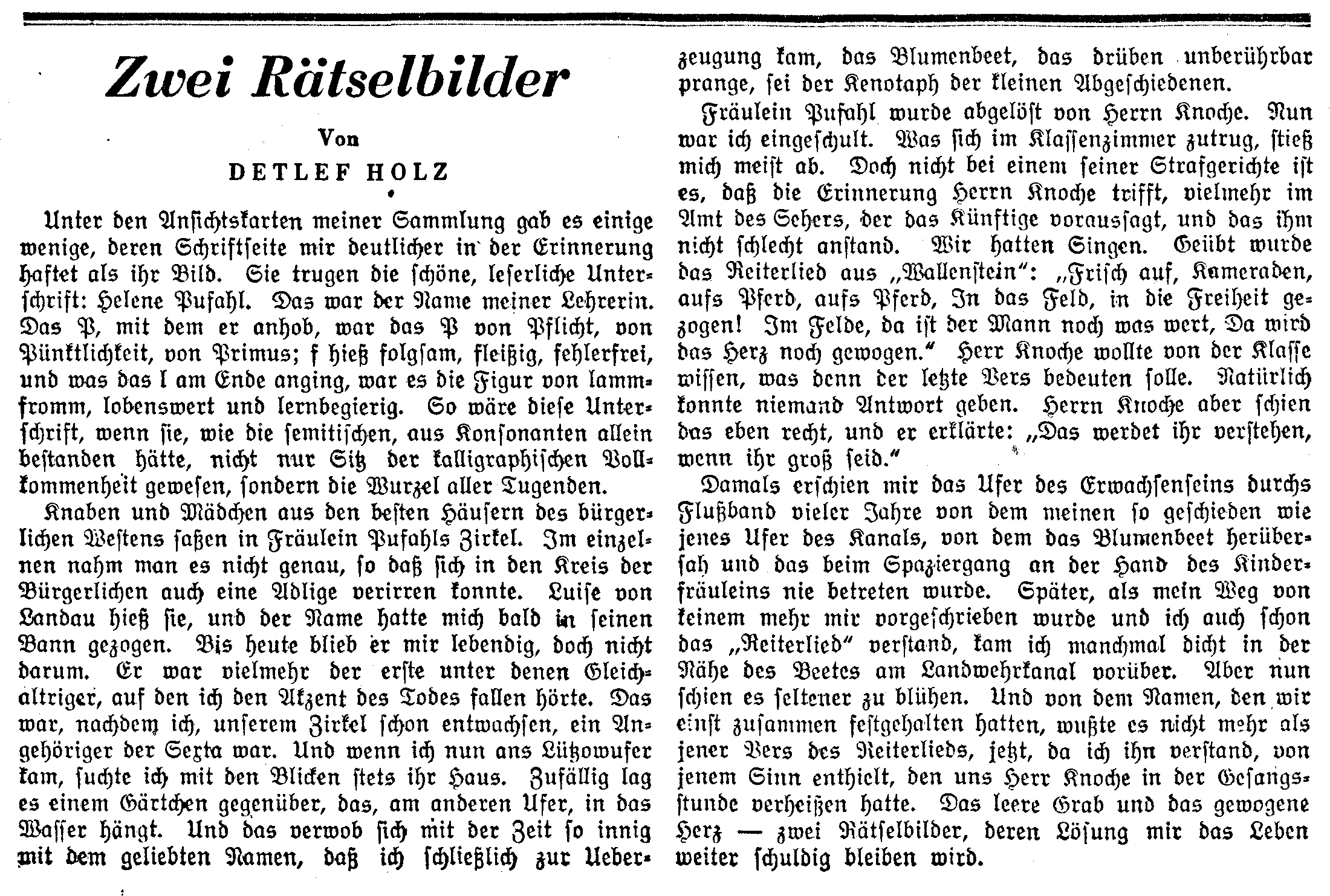 Detlef Holz (= Walter Benjamin): Zwei Rätselbilder. In: Das Unterhaltungsblatt der Vossischen Zeitung, Nr. 164, vom 16. Juni 1933, Seite 1